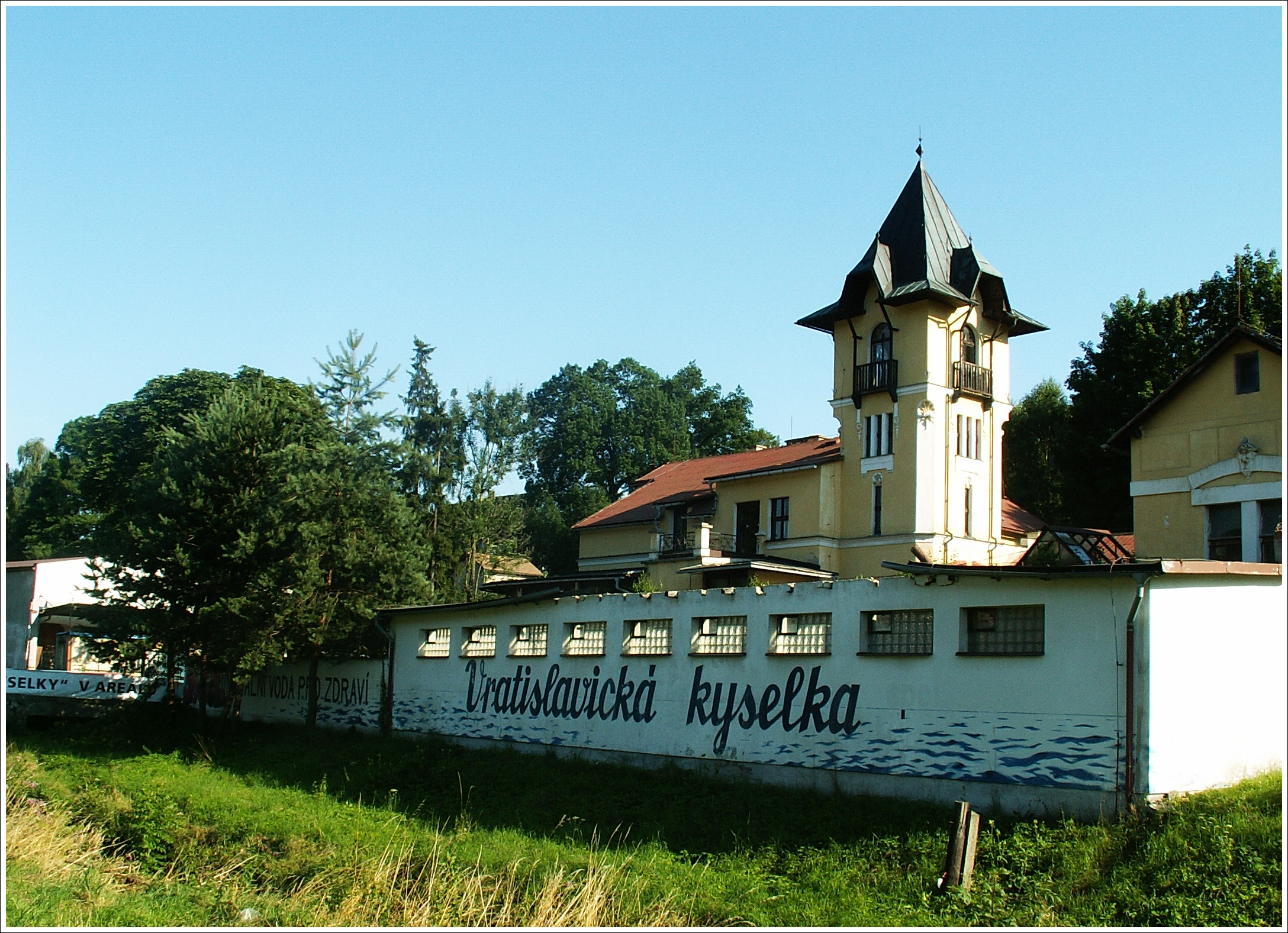 Kyselka Vratislavice nad Nisou